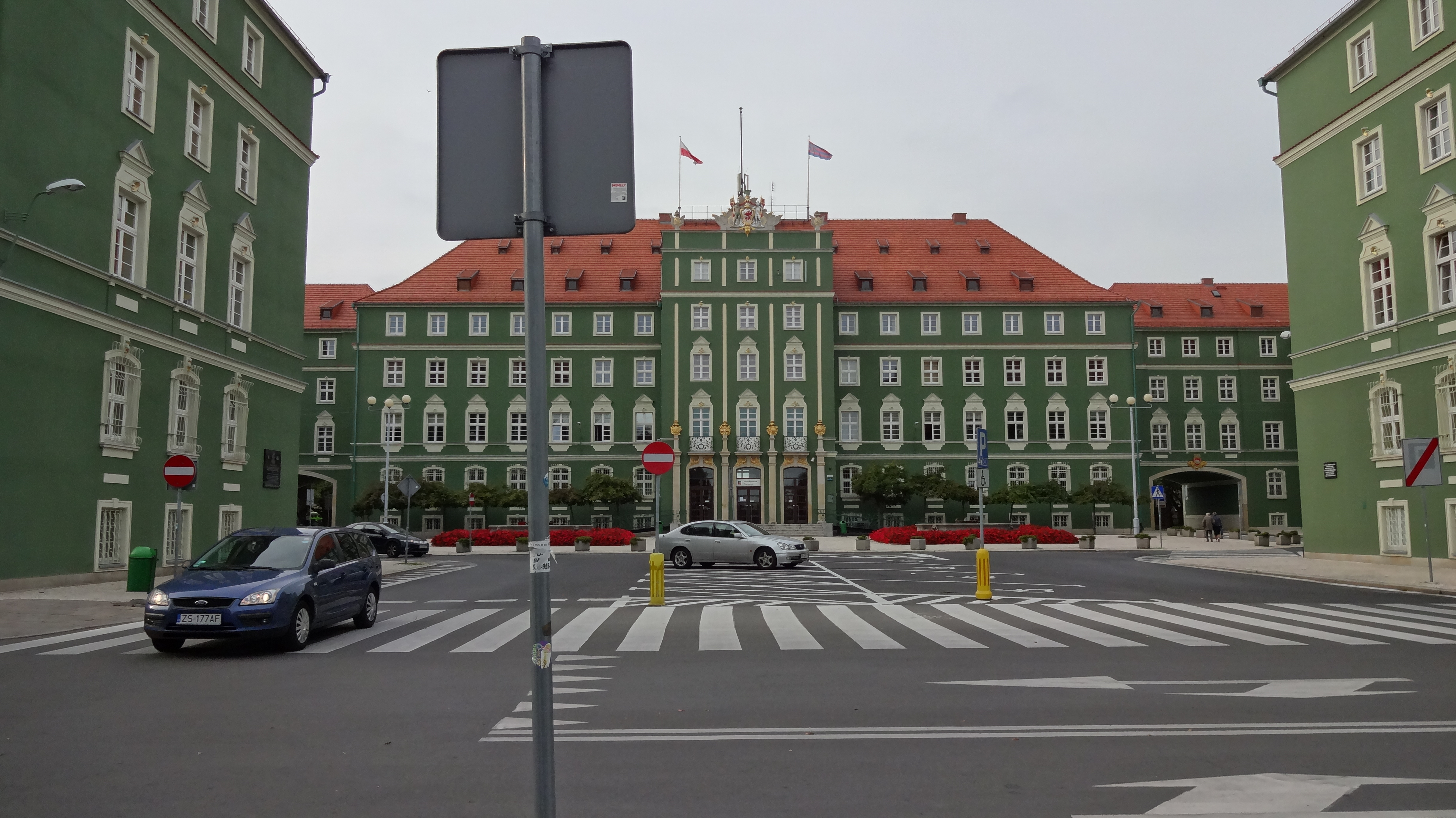 Szczecin, gmach władz Prowincji Pomorskiej (ze skrzydłami wsch. i zach.), 1924-1927